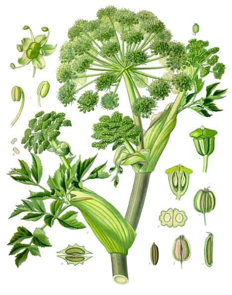 Engelwurz. A oberer Theil der Pflanze, natürl. Grösse; 1 Blüthe, vergrössert; 2 Staubblätter, desgl.; 3 Pollen, desgl.; 4 Stempel, desgl.; 5 derselbe im Längsschnitt, desgl.; 6 derselbe im Querschnitt, desgl.; 7ab Frucht natürl. Grösse und vergrössert; 8 dieselbe im Längsschnitt, vergrössert; 9 Same, desgl.; 10 Frucht im Querschnitt, desgl.; 11 Spaltfrüchtchen im Längsschnitt, desgl.